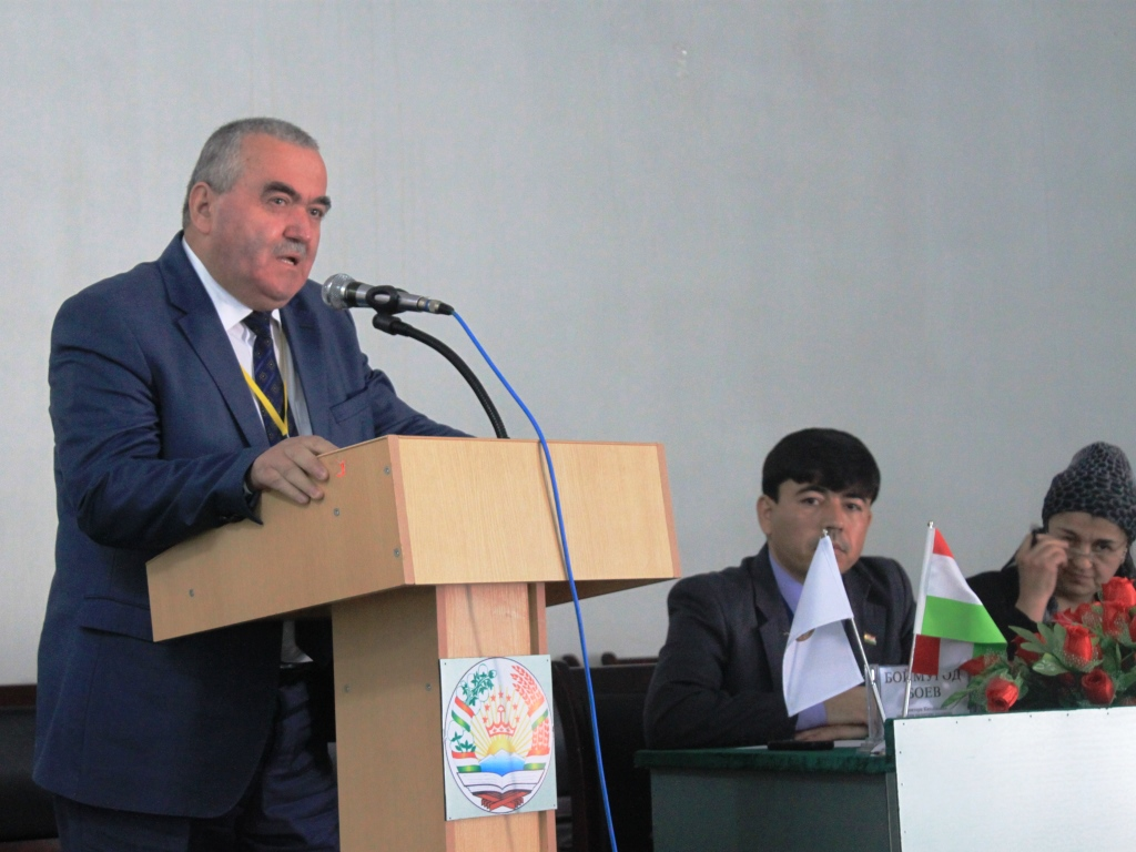 На конференции, Комилзода Шариф.